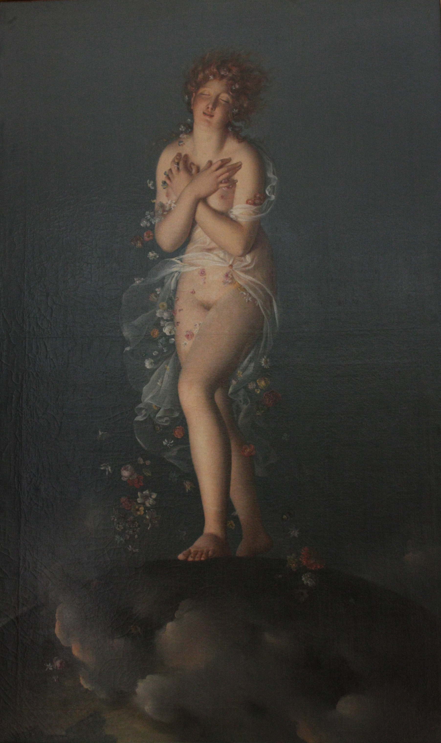 Flore caressée par Zéphyr de François Gérard dit Baron Gérard, 1802